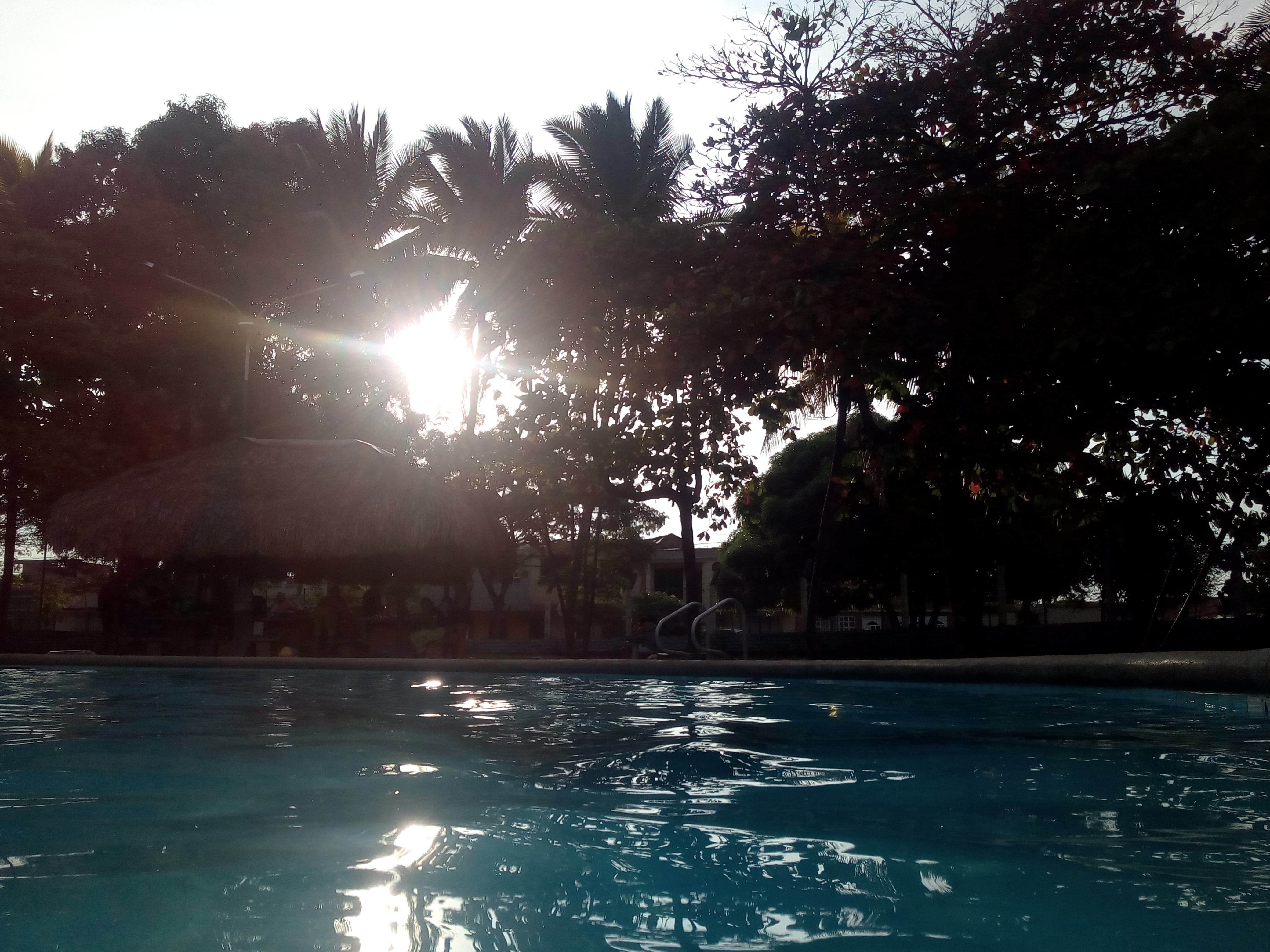 Foto tomada en el Bosque Municipal de Palmira.